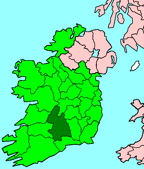 Tipperary